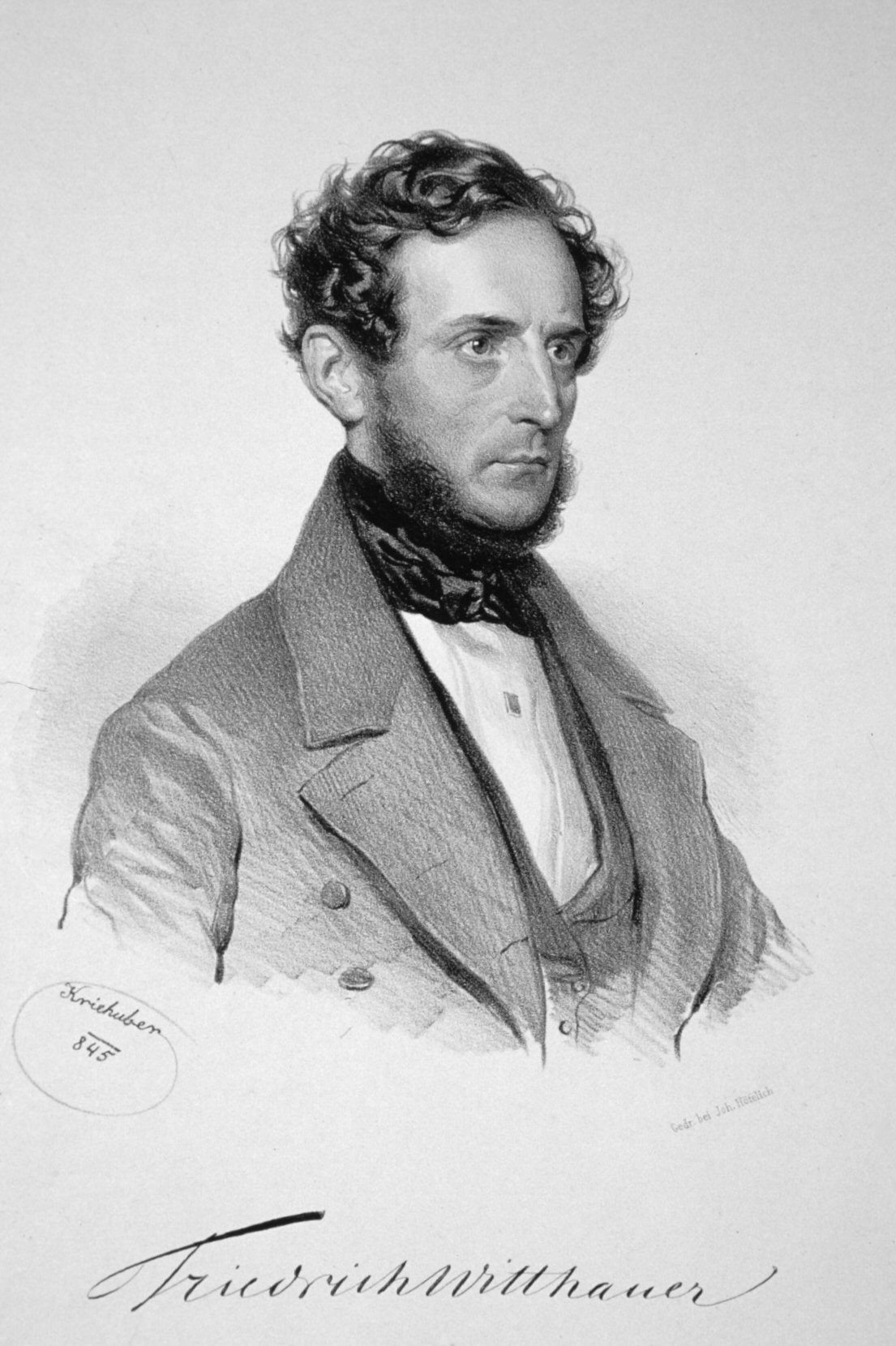 Friedrich Witthauer (1793-1846), Journalist, Redakteur und Herausgeber der Wiener Zeitschrift für Kunst, Literatur, Theater und Mode. Beilage zur Wiener Zeitung No 23, 1. Februar 1845.